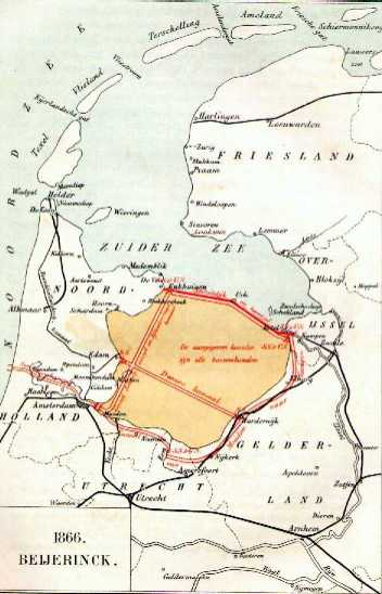 Plan Beyerinck. Auteursrecht verlopen. Herkomst